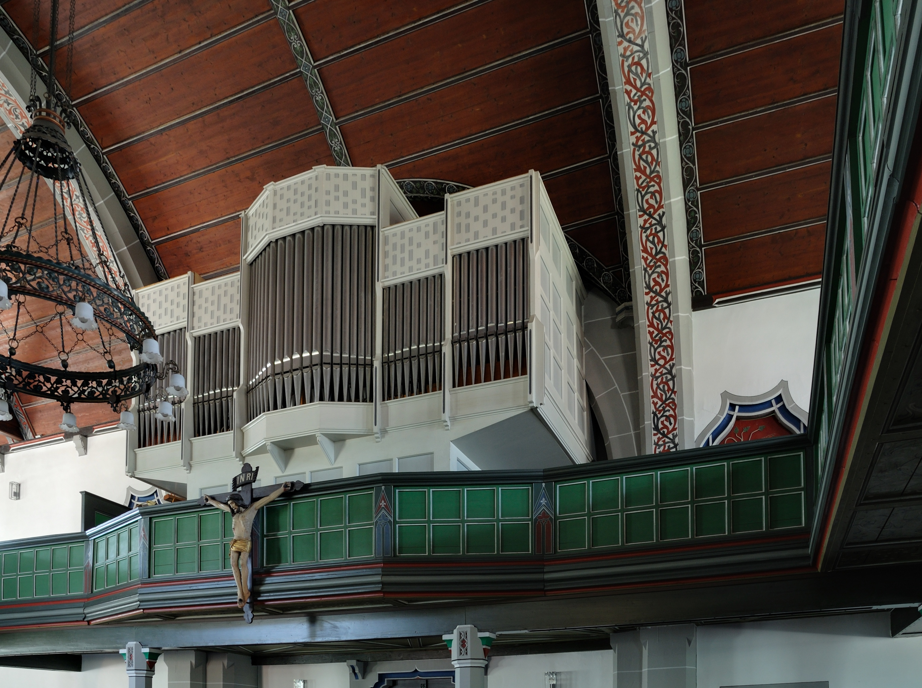 Lörrach: Orgel der Germanuskirche